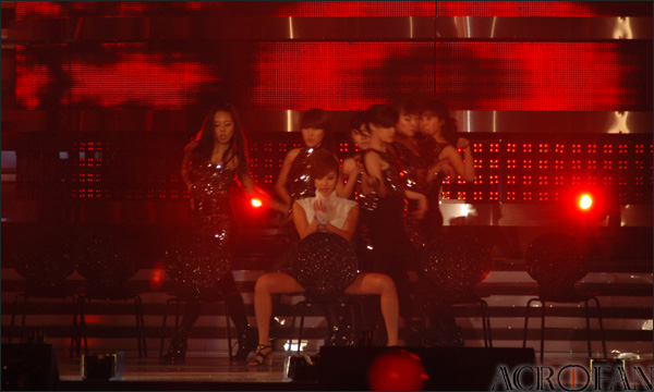 농심 협찬 제9회 '2008 사랑나눔콘서트'